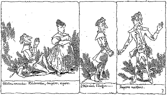 Extrait de l'oeuvre M. Vieux-Bois (publié en 1842) de Rodolf Töpffer (1799-1846)